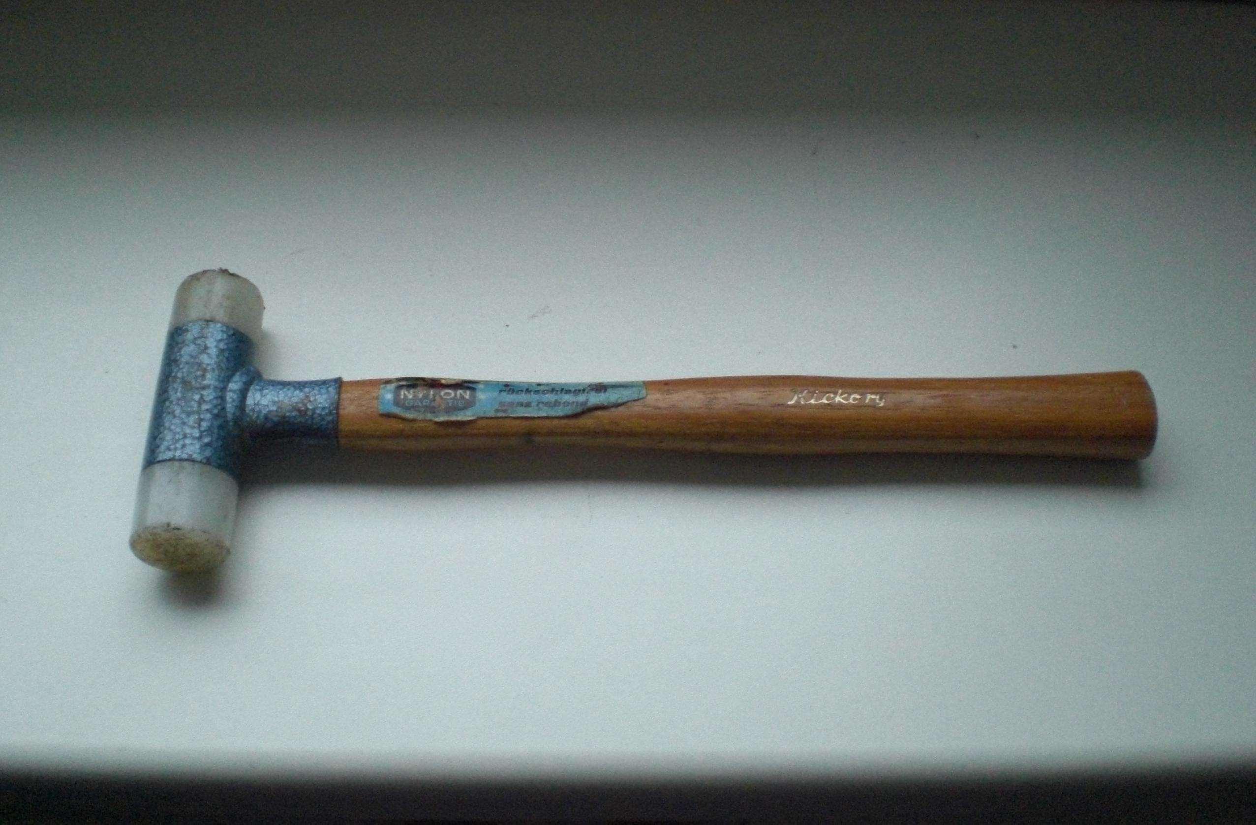 Kunststoffhammer mit Pendelgewicht im Kopf. Dadurch ist das Werkzeug rückschlagfrei